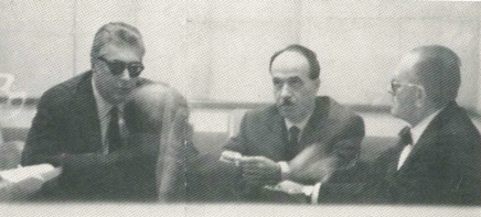 Lo scrittore Luigi Silori con il ministro Luigi Preti e il giornalista Alberto Sensini, Roma 1968